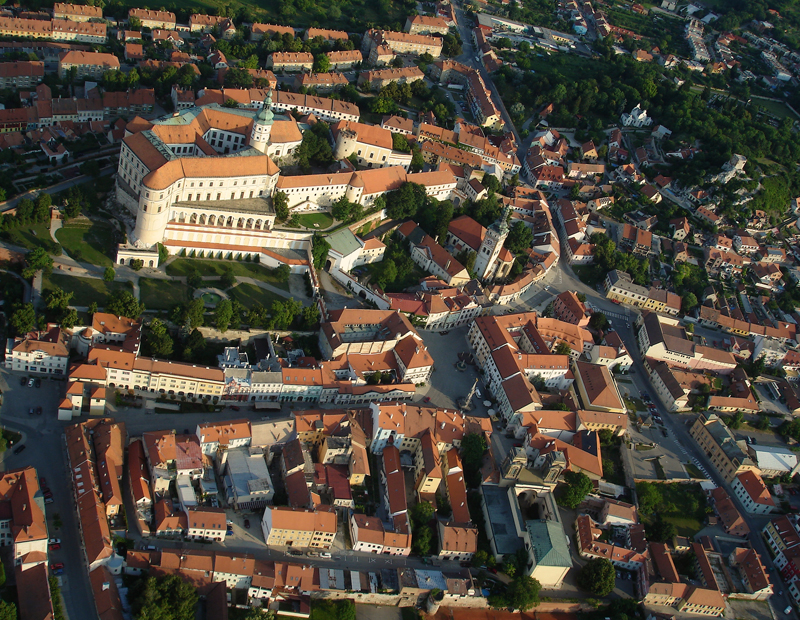 Mikulov slottet och gamla staden.